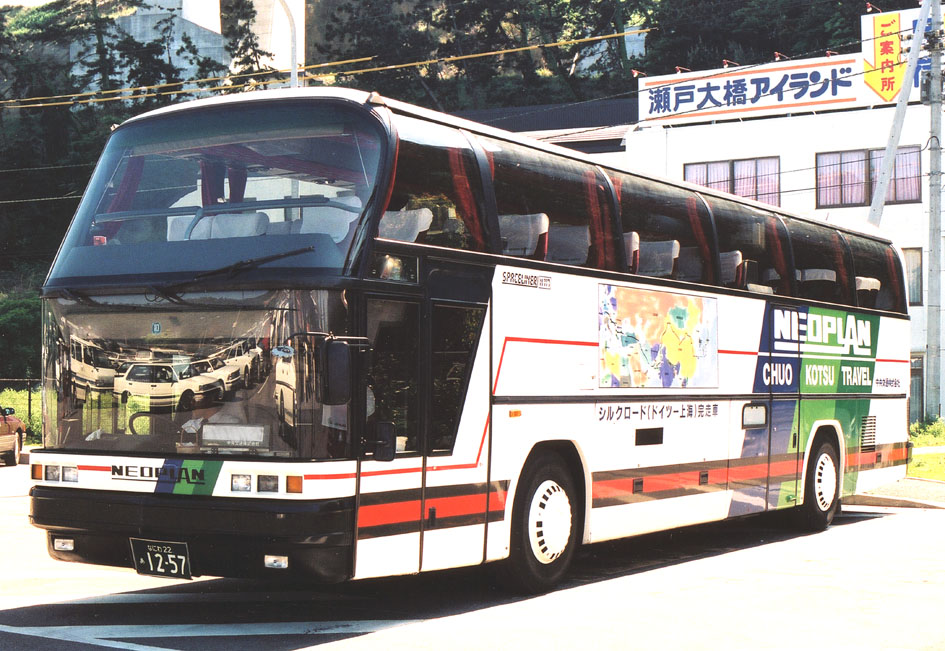 中央交通（大阪）ネオプラン スペースライナーN117.